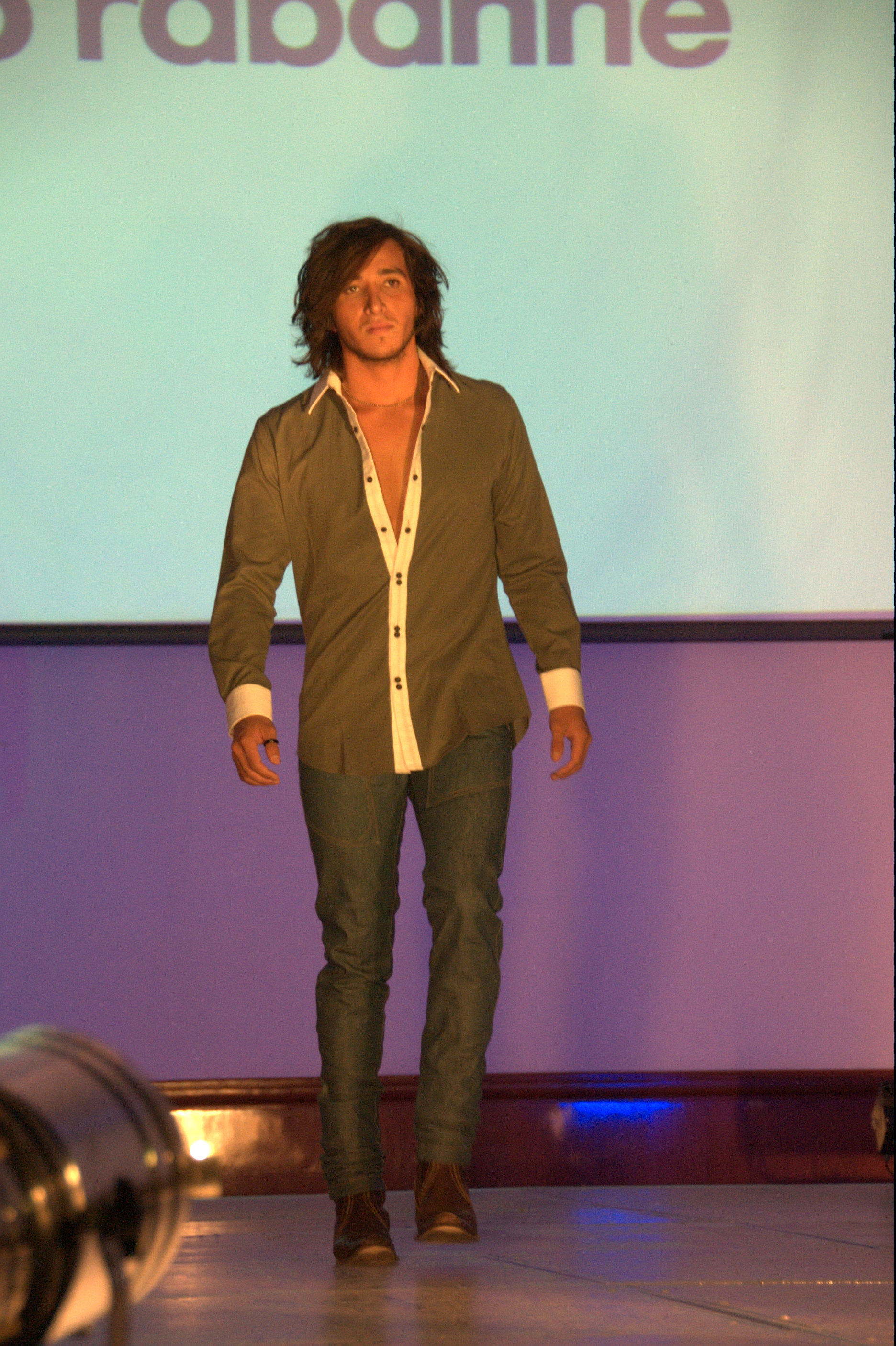 modelo presentando ropa de Paco Rabanne en pasarela en ITESM CCM